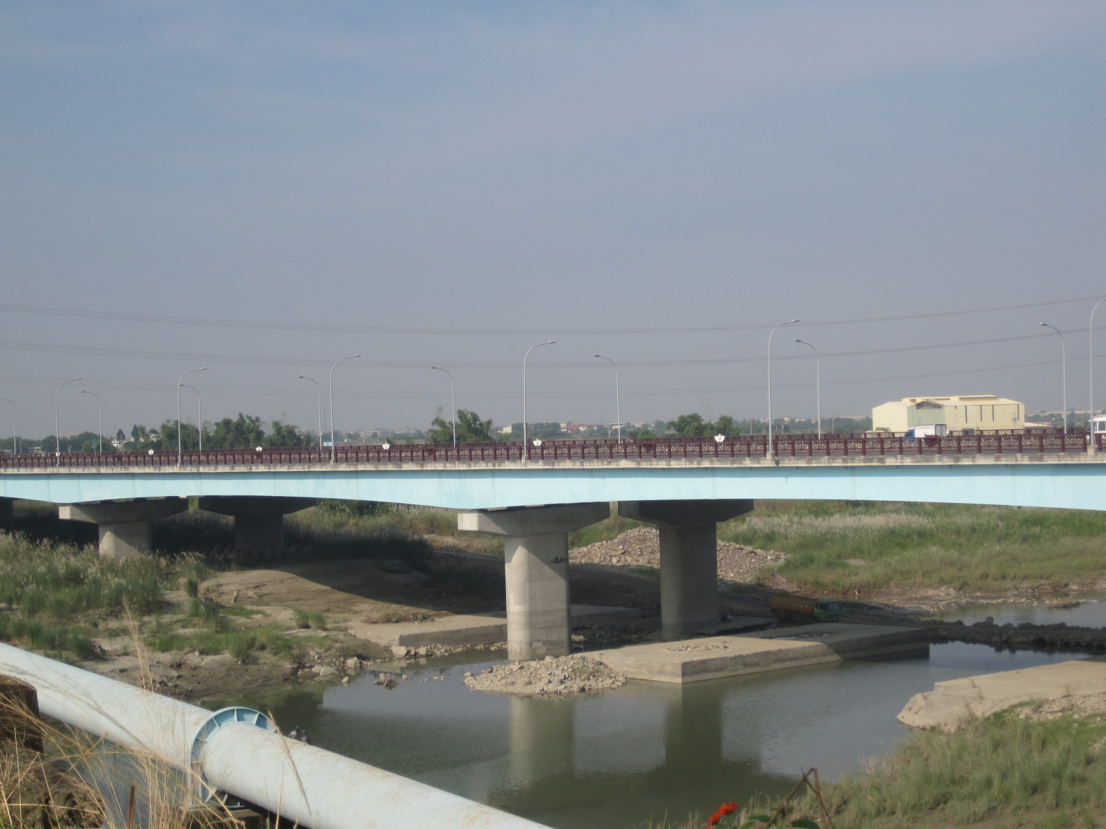 臺一線的曾文溪橋。